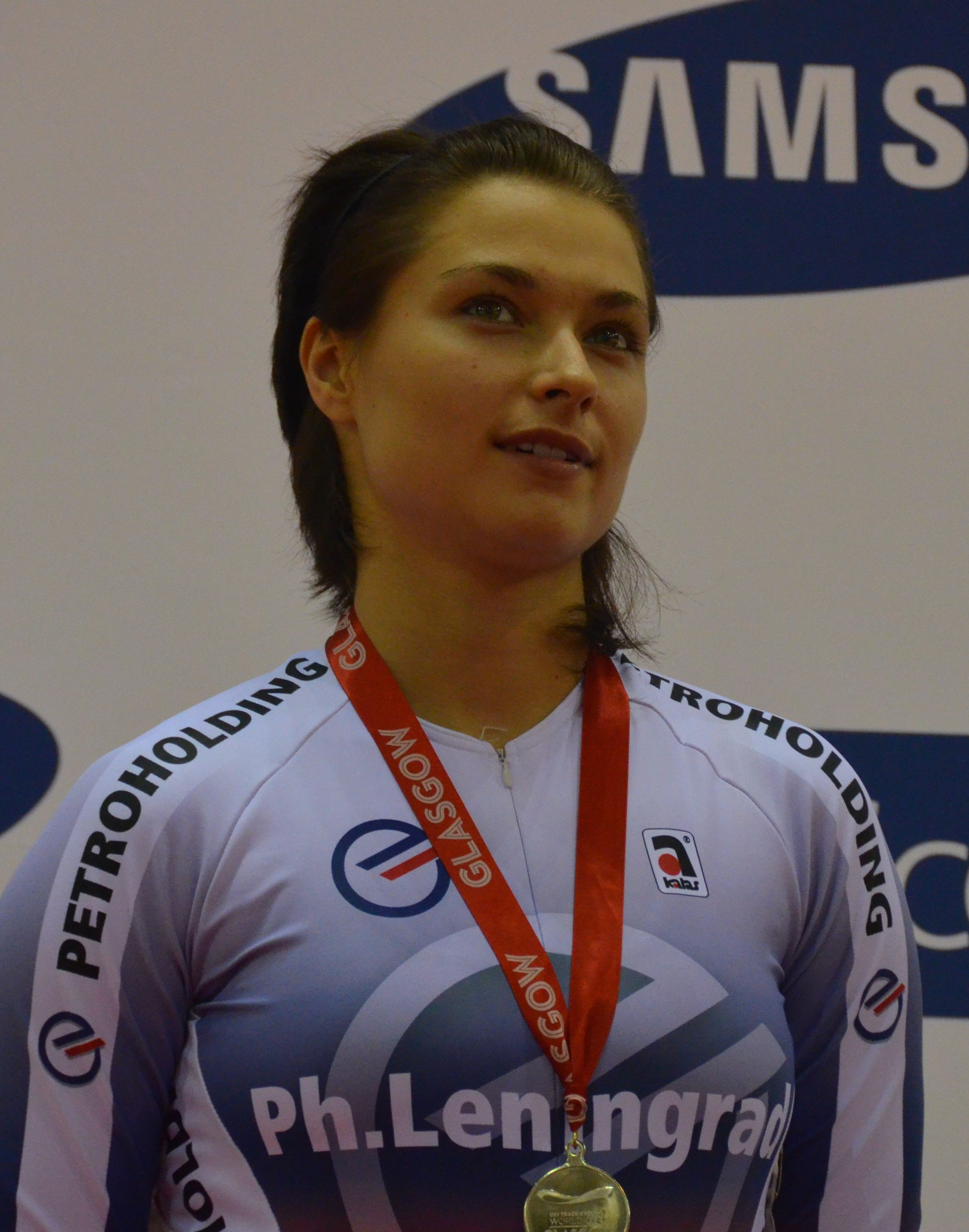 Ekaterina Gnidenko, russische Radsportlerin